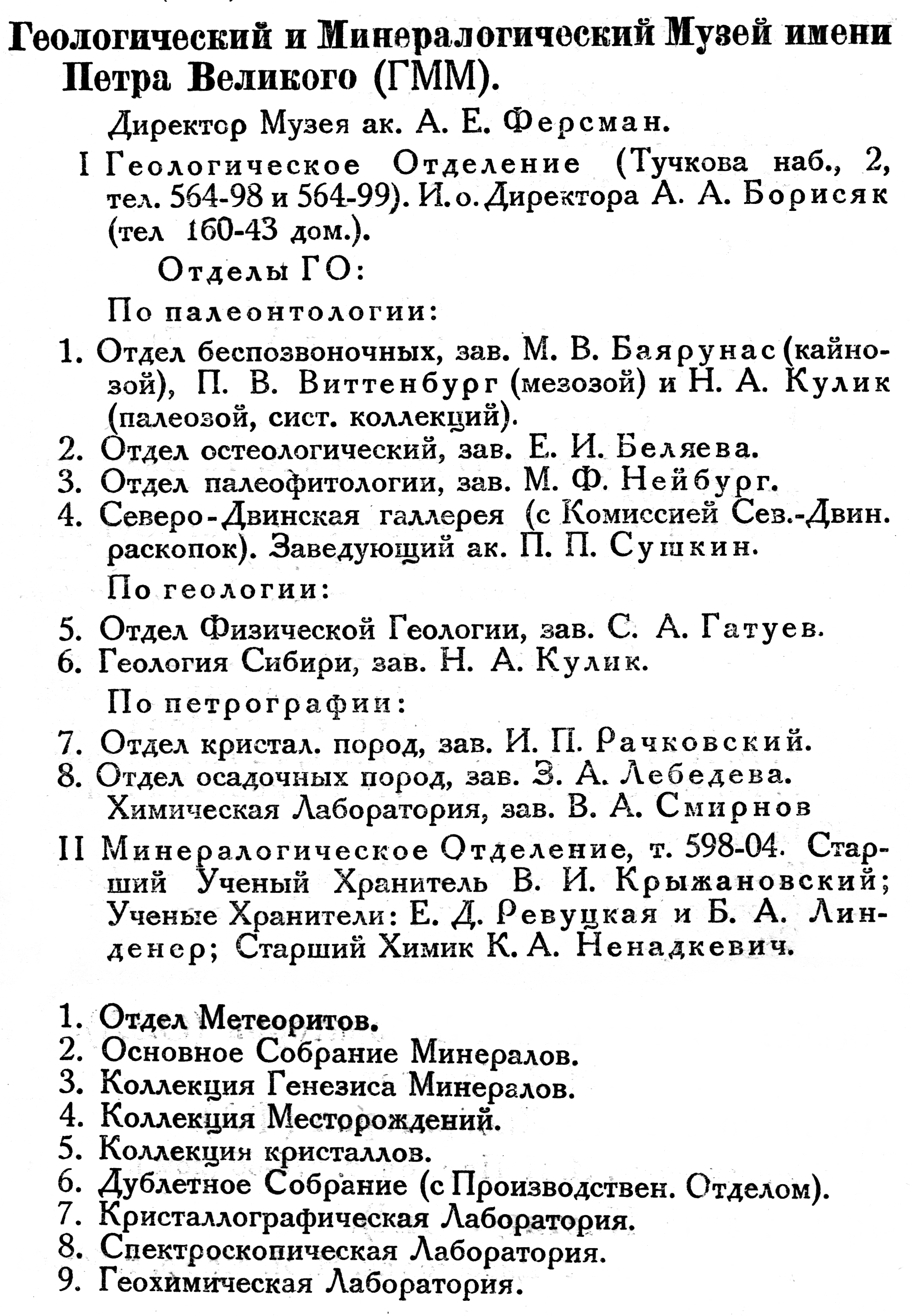 Геологический и минералогический музей имени Петра великого (ГММ) РАН, 1925